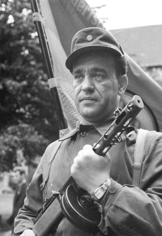 ADN-ZB-Brüggmann-Sicherung der Staatsgrenze 13.8.1961. Berlin: Nach ihrem Einsatz zur Sicherung der Staatsgrenze wurden Mitglieder der Kampfgruppen aus dem Stadtbezirk Mitte auf einem Appell am 23.8.1961 verabschiedet, um wieder in ihren Betrieben die Arbeit aufzunehmen. - Während des Appells.